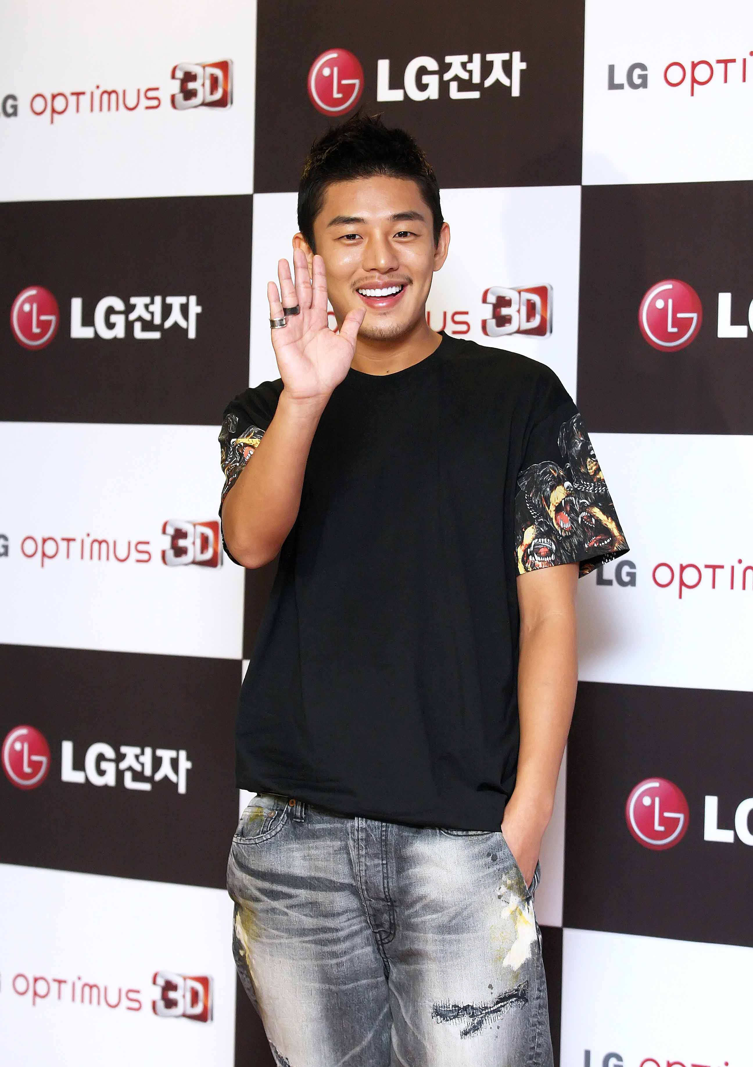 LG 스마트폰, 블록버스터와 공동 마케팅 개시: LG전자‘옵티머스3D’와 ‘트랜스포머 3’가 만났다. 6월 28일 저녁 상암 CGV에서 열린 ‘옵티머스 3D와 함께하는 트랜스포머3 시사회'에 참석한 유아인.